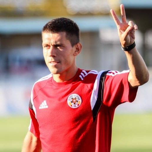 Сергей Сергеевич Кравченко